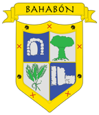 Escudo del Ilustrísimo Ayuntamiento de Bahabón (Valladolid : España)